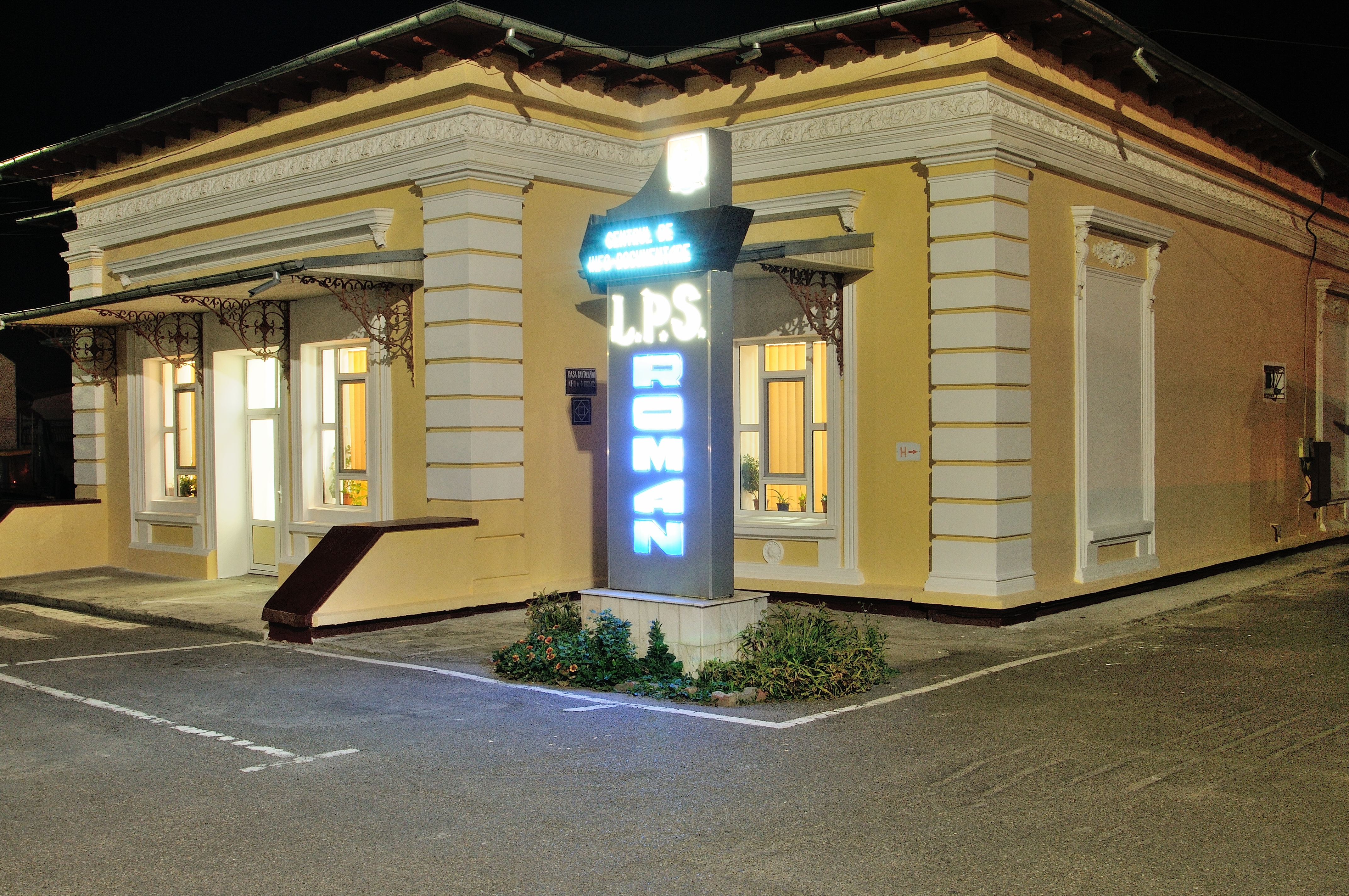 Biblioteca-Centrul de Informare si Documentare Construita 1921-1923 prin donatia printesei Maria Sturza, fiica lui Ion Ghica si fiica acesteia, printesa Ecaterina Cantacuzino. 02